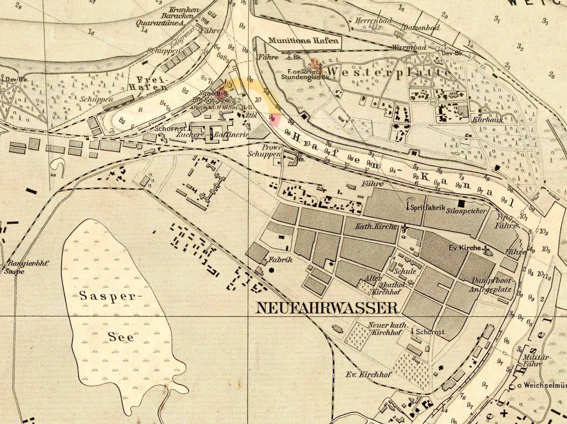 Gdańsk Nowy Port (Neufahrwasser) i jezioro Zaspa.